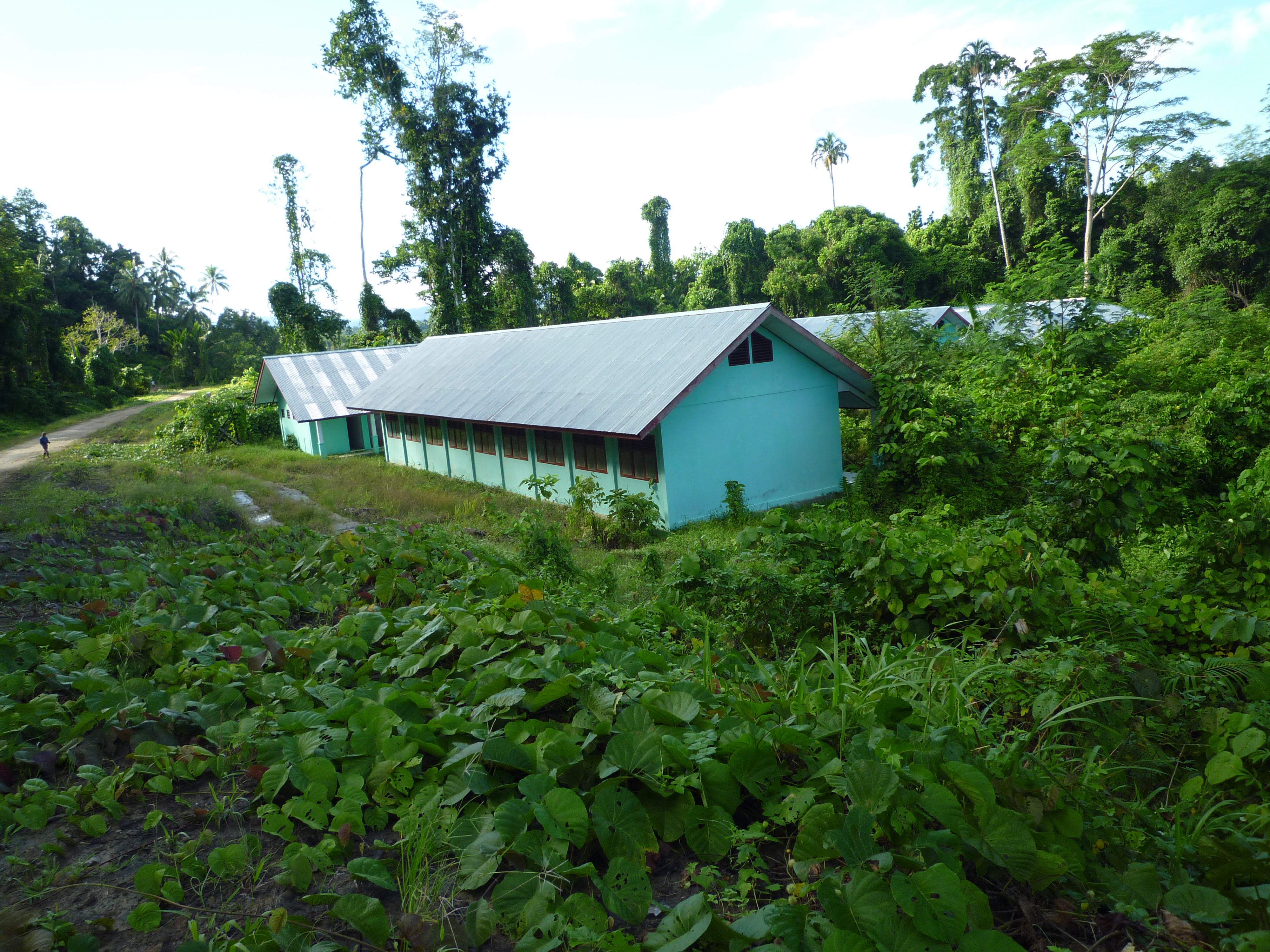 Block Grant USB, SMPN Waho, Kaimana, Papua Barat